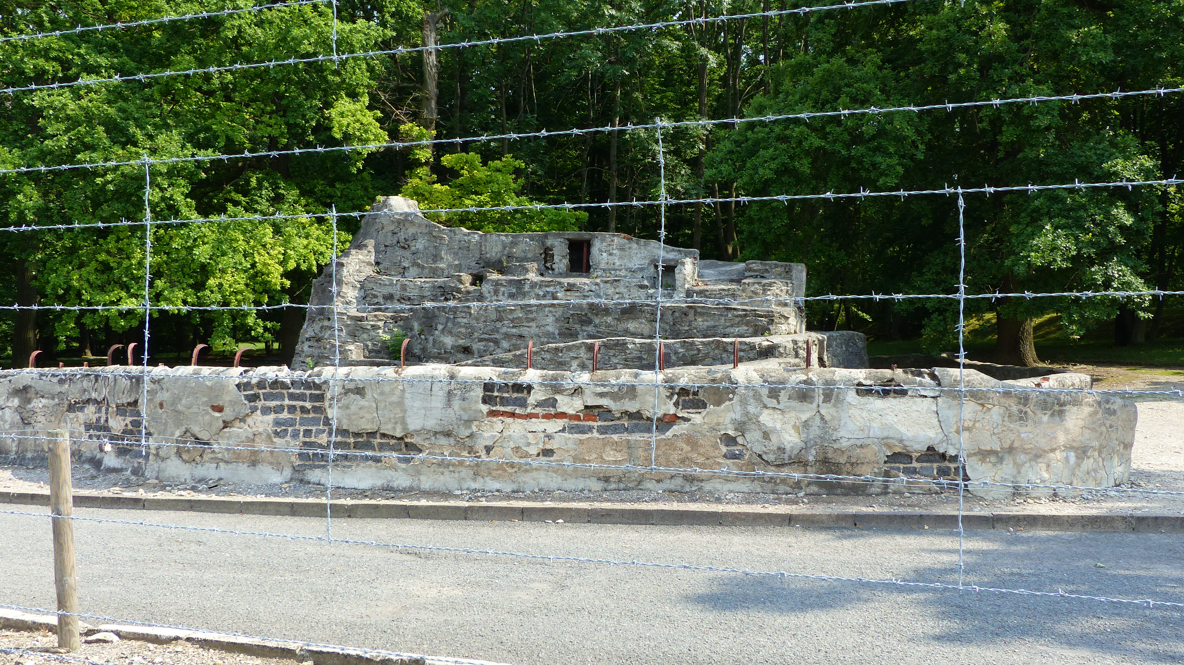 KZ Buchenwald: SS-Zoo, Weimar